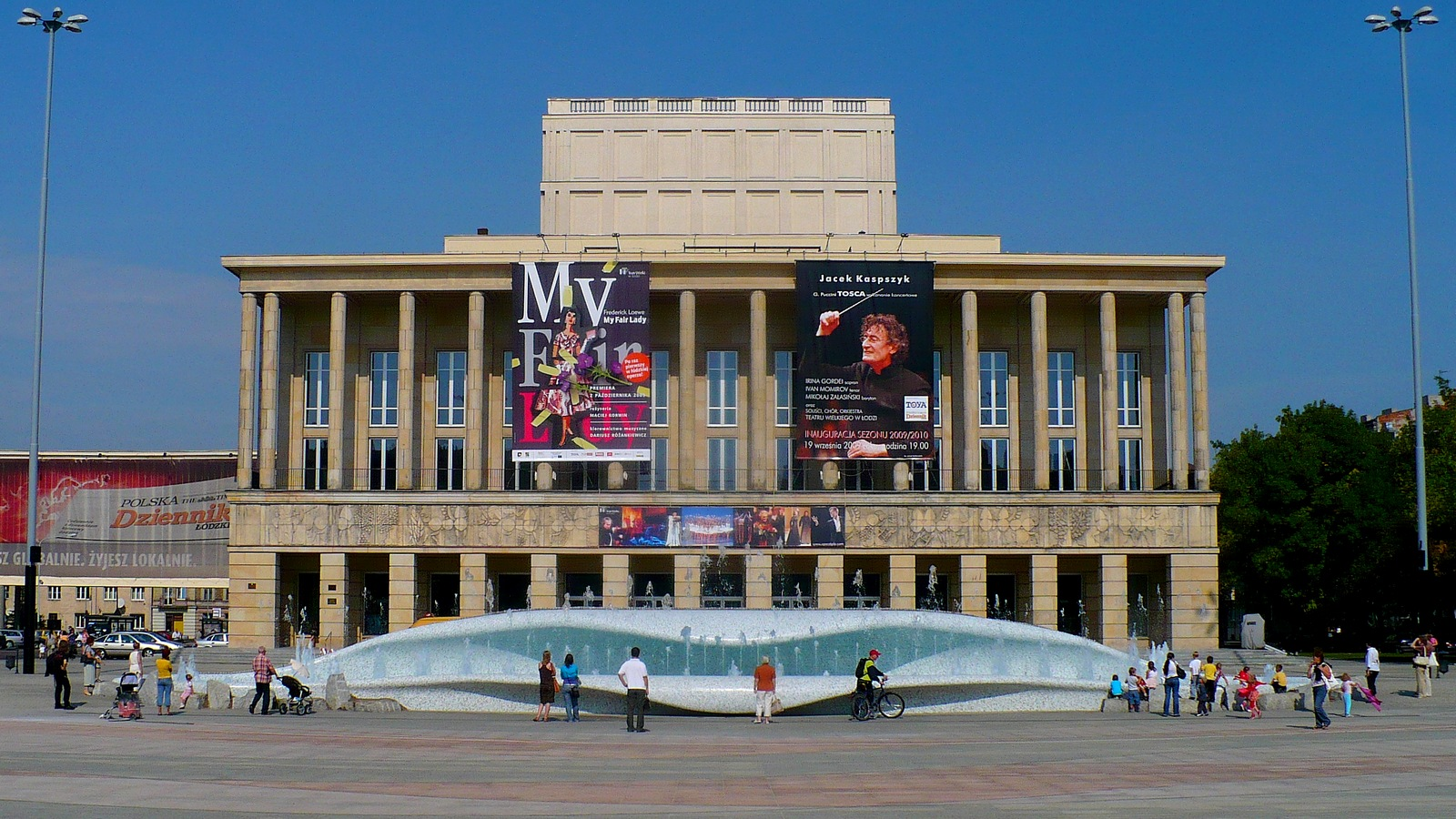 Plac Dąbrowskiego z nową fontanną i Teatrem Wielkim w tle.